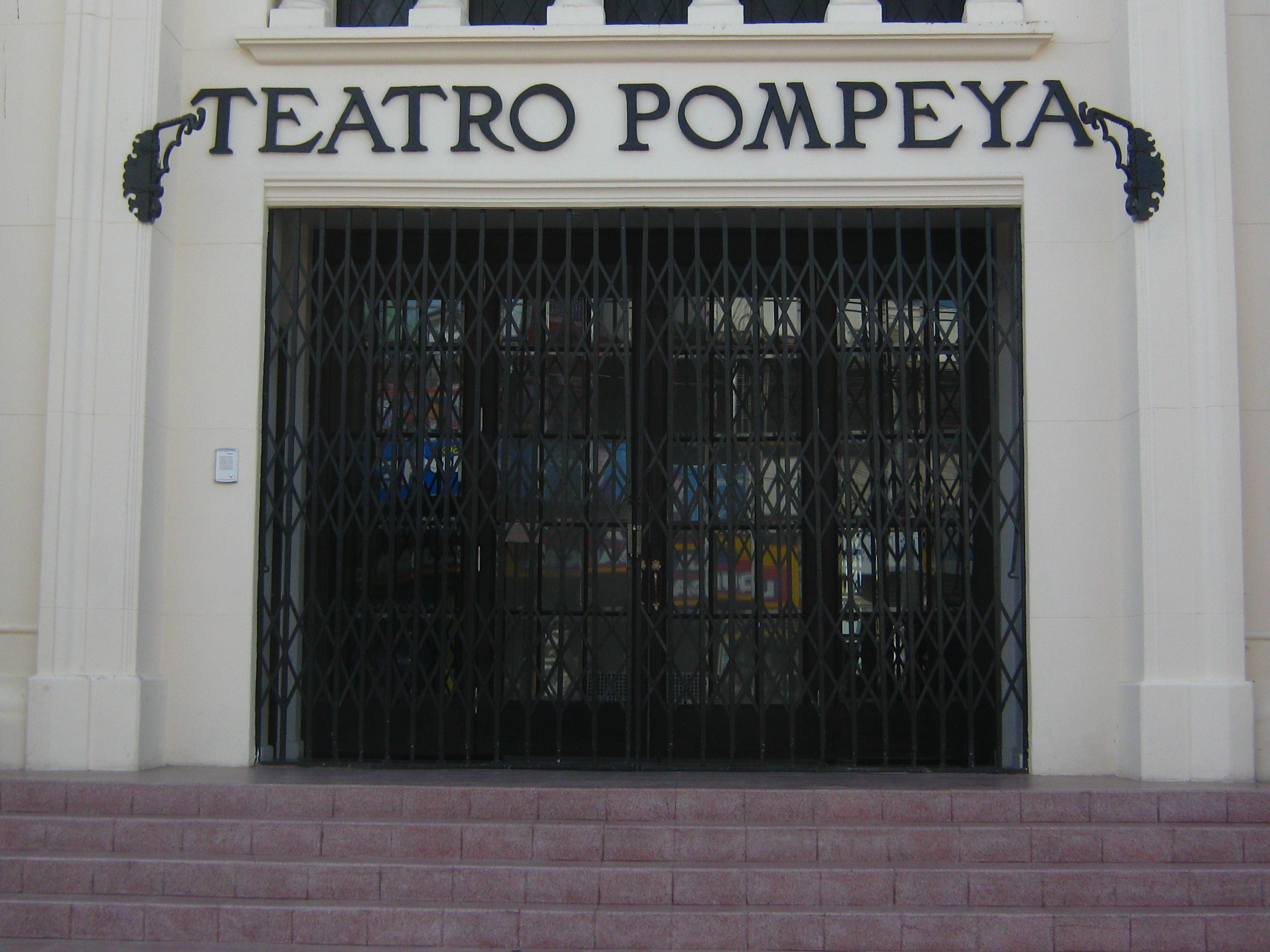 Teatro Pompeya y sus portales This is a photo of a national monument in Chile: 2081